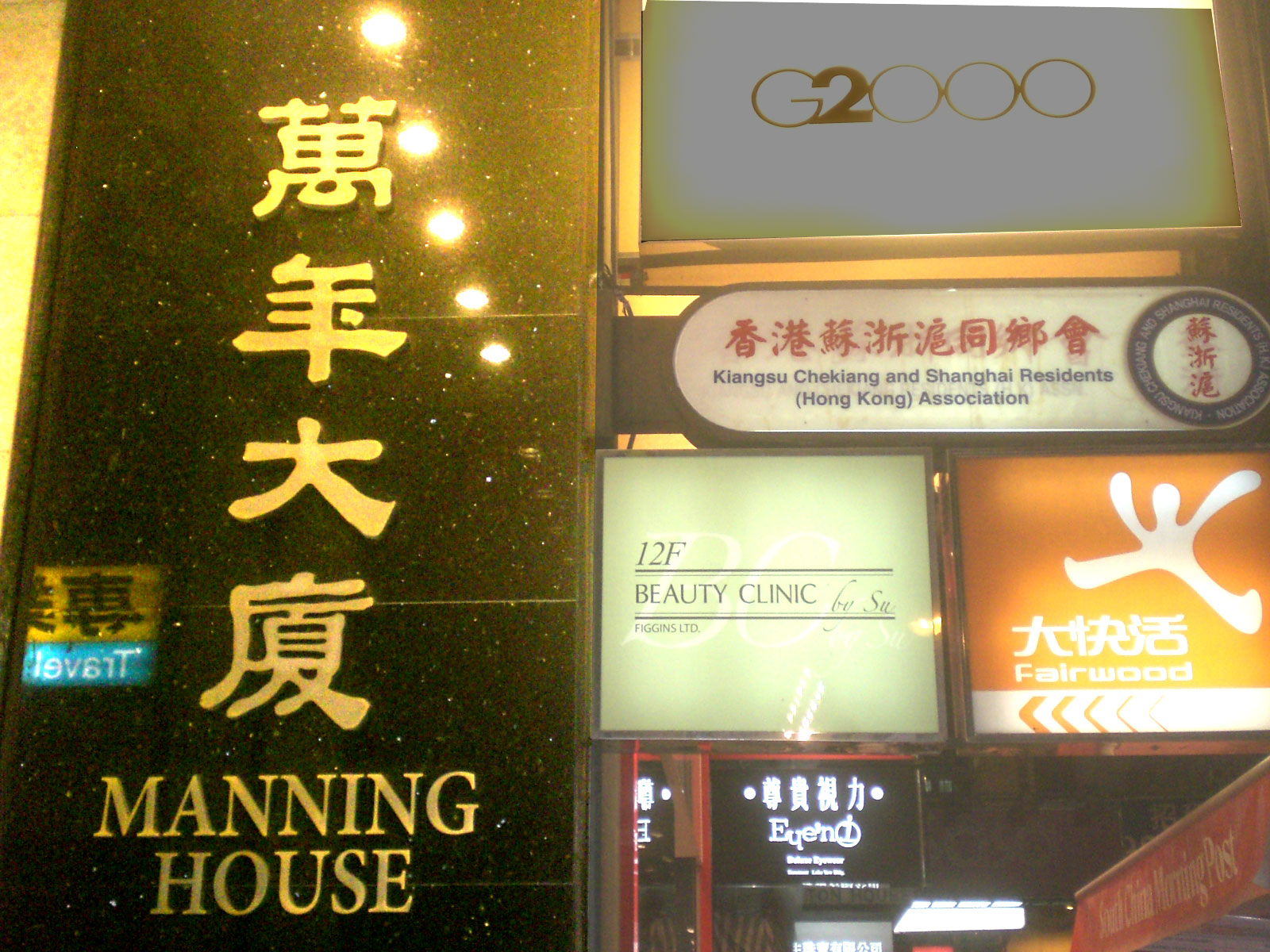 香港中環zh:萬年大廈